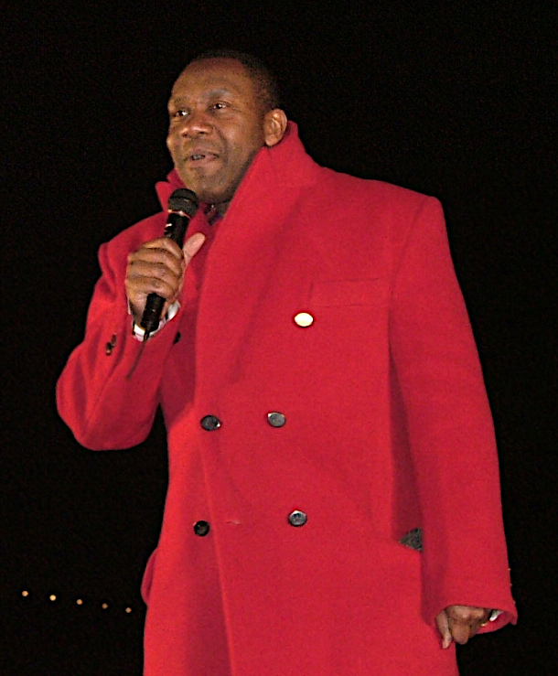 Lenny Henry red nose day 21-02-2005